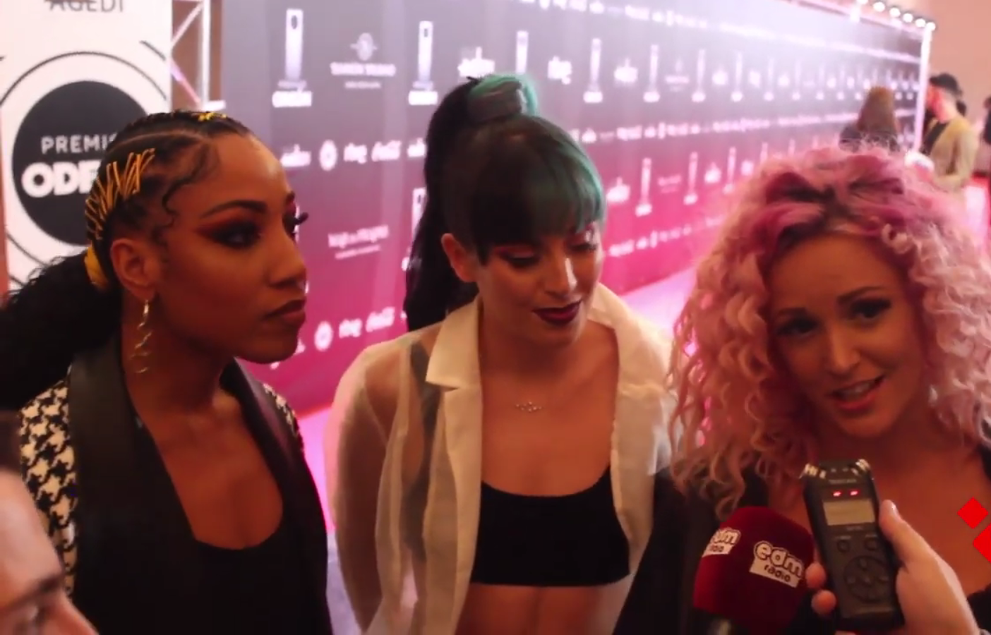 Sweet California en Premios Odeón 2020